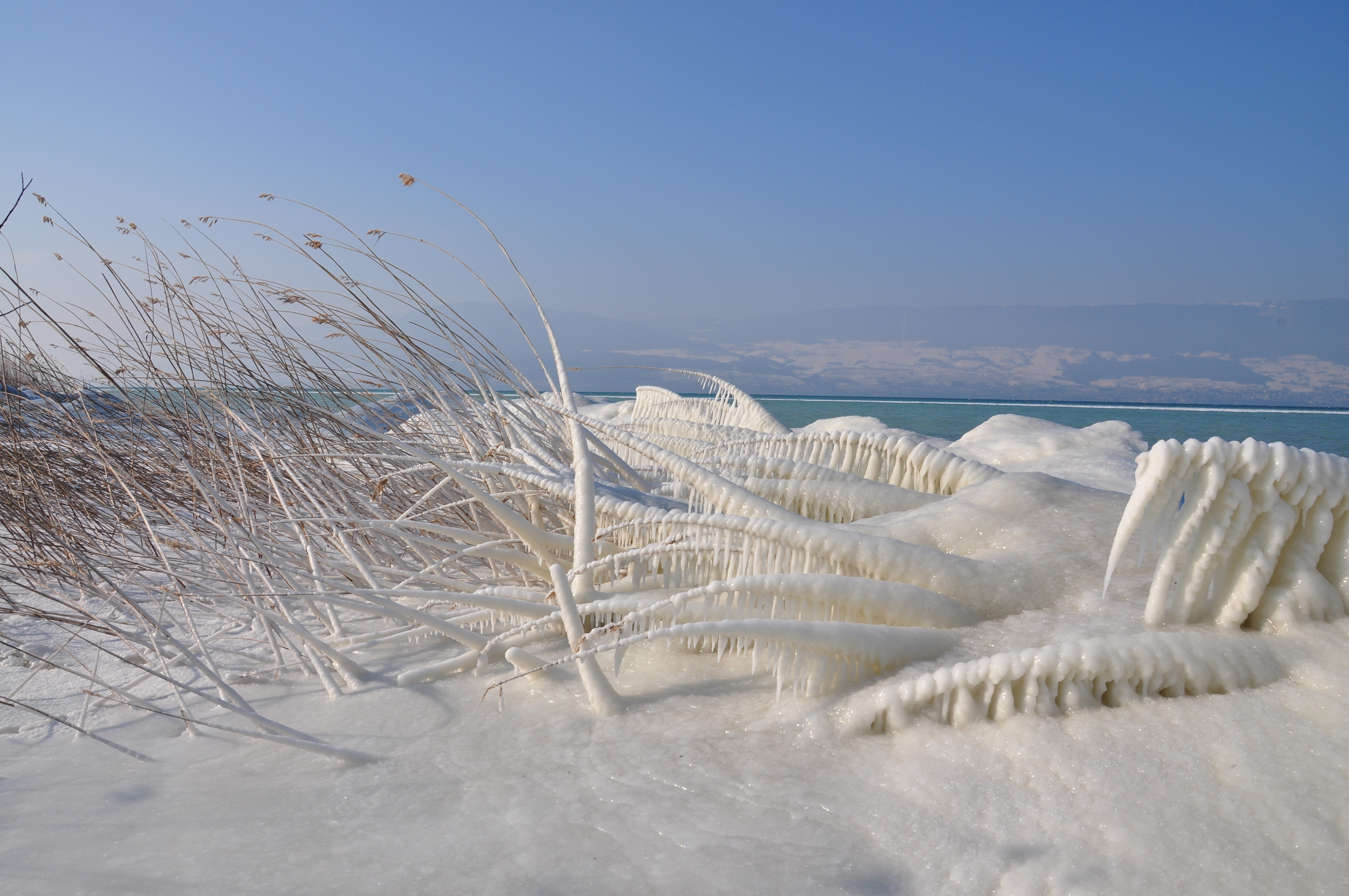 Entre Font et Estavayer-le-Lac (Suisse) par grand froid (-10°C) et forte bise en février 2012.